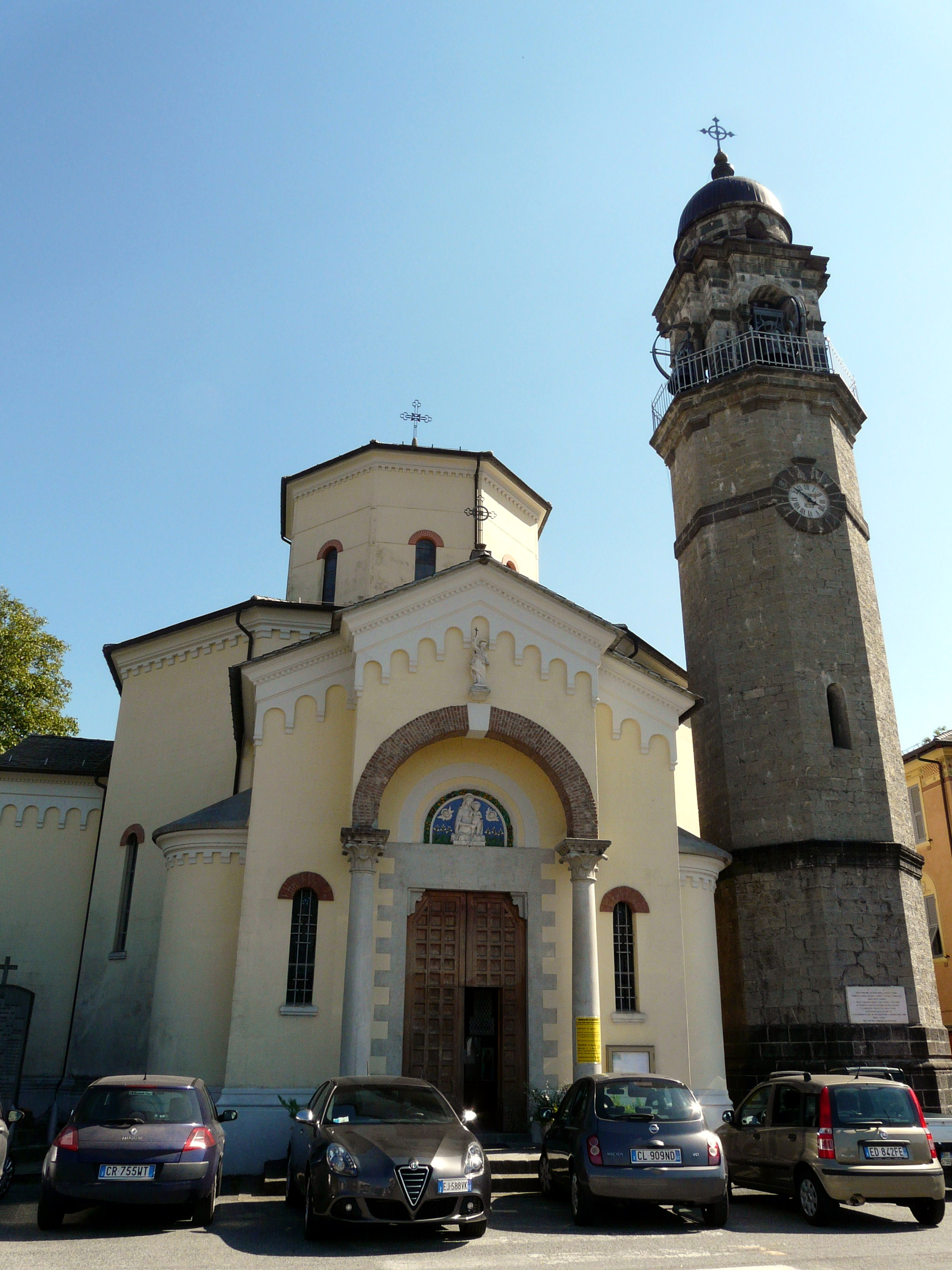 Serie di immagini della chiesa di San Bartolomeo, Magnasco, Rezzoaglio, Liguria, Italia